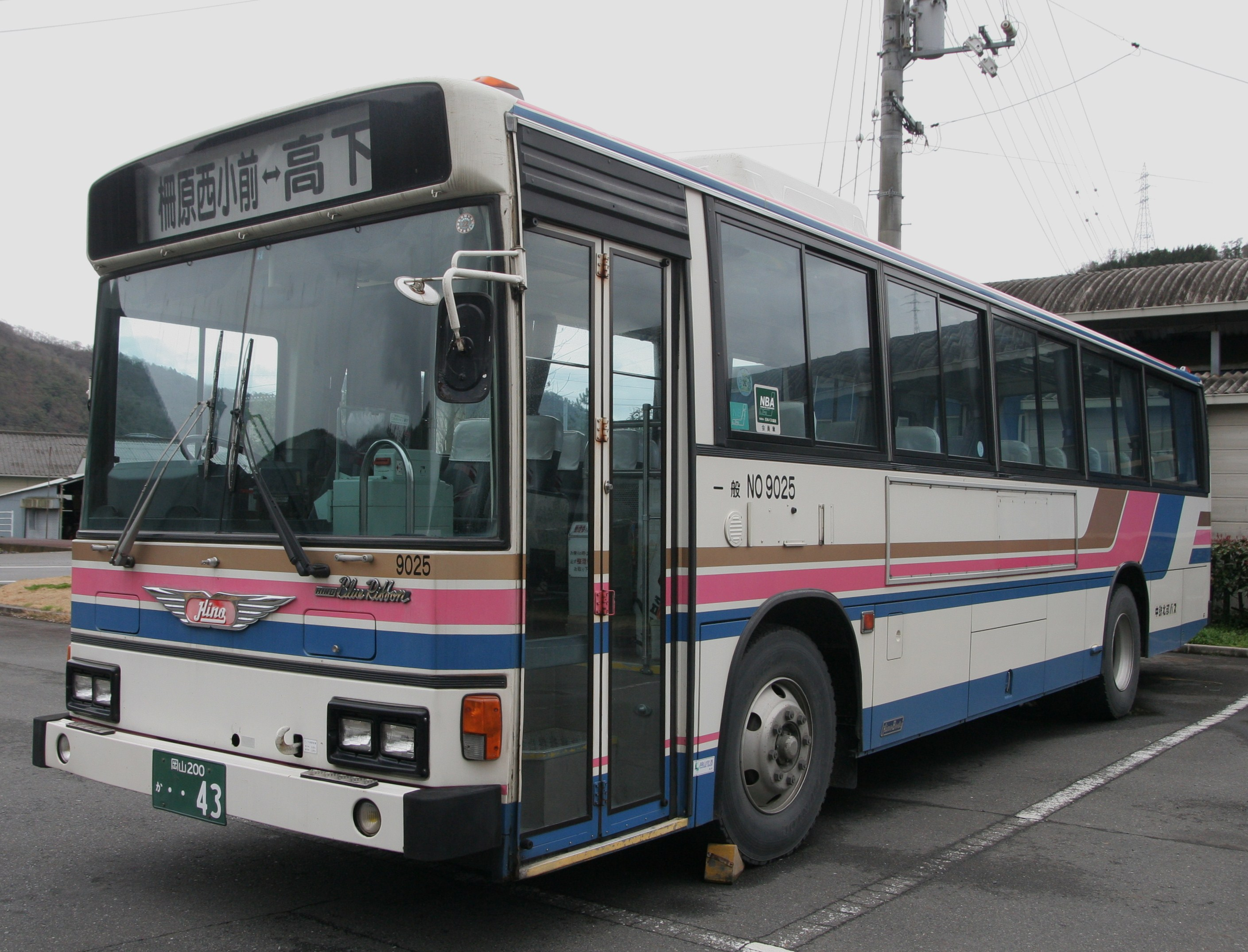 中鉄北部バス 日野 岡山200か・・43